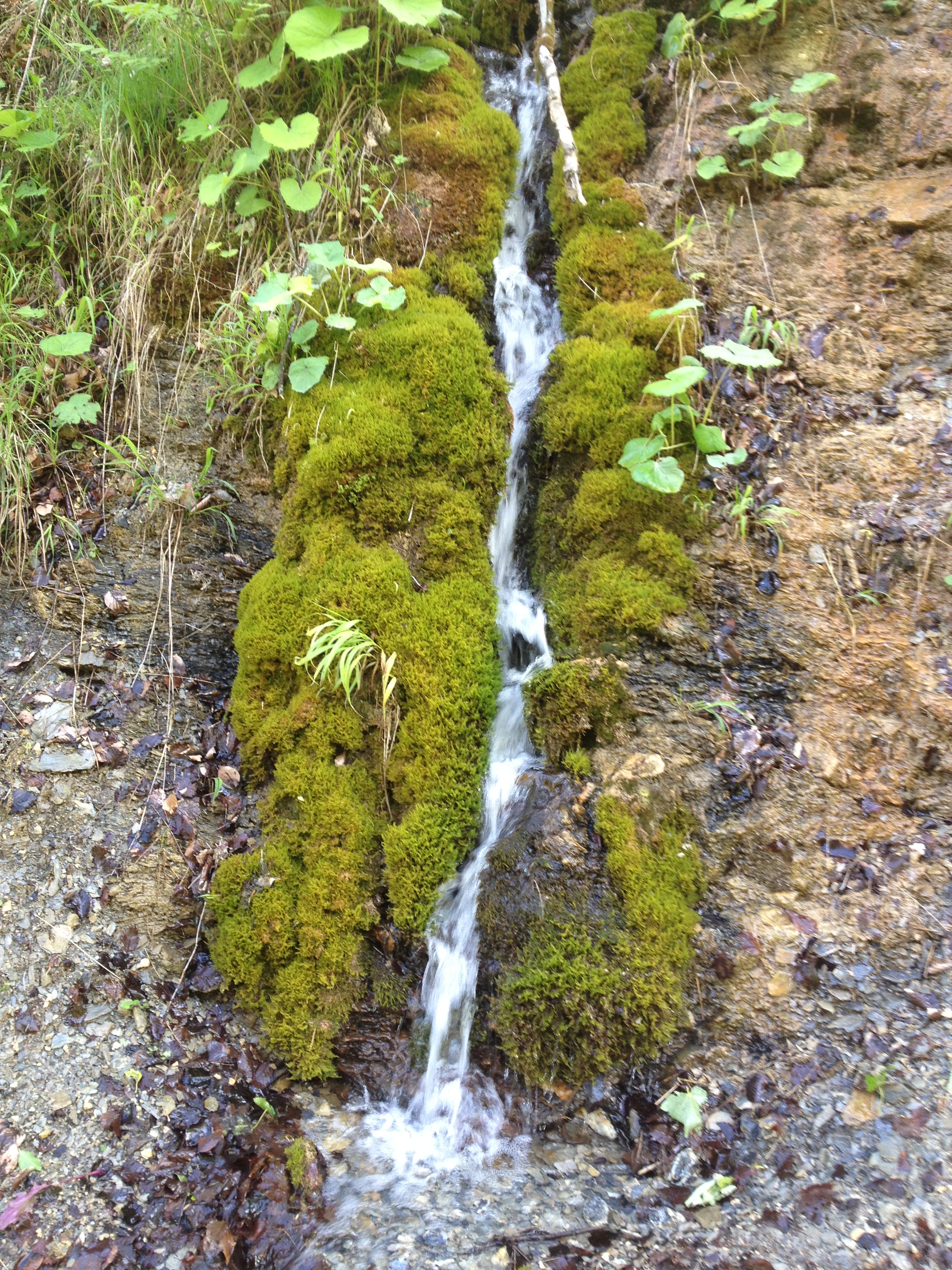 Eine Quelle